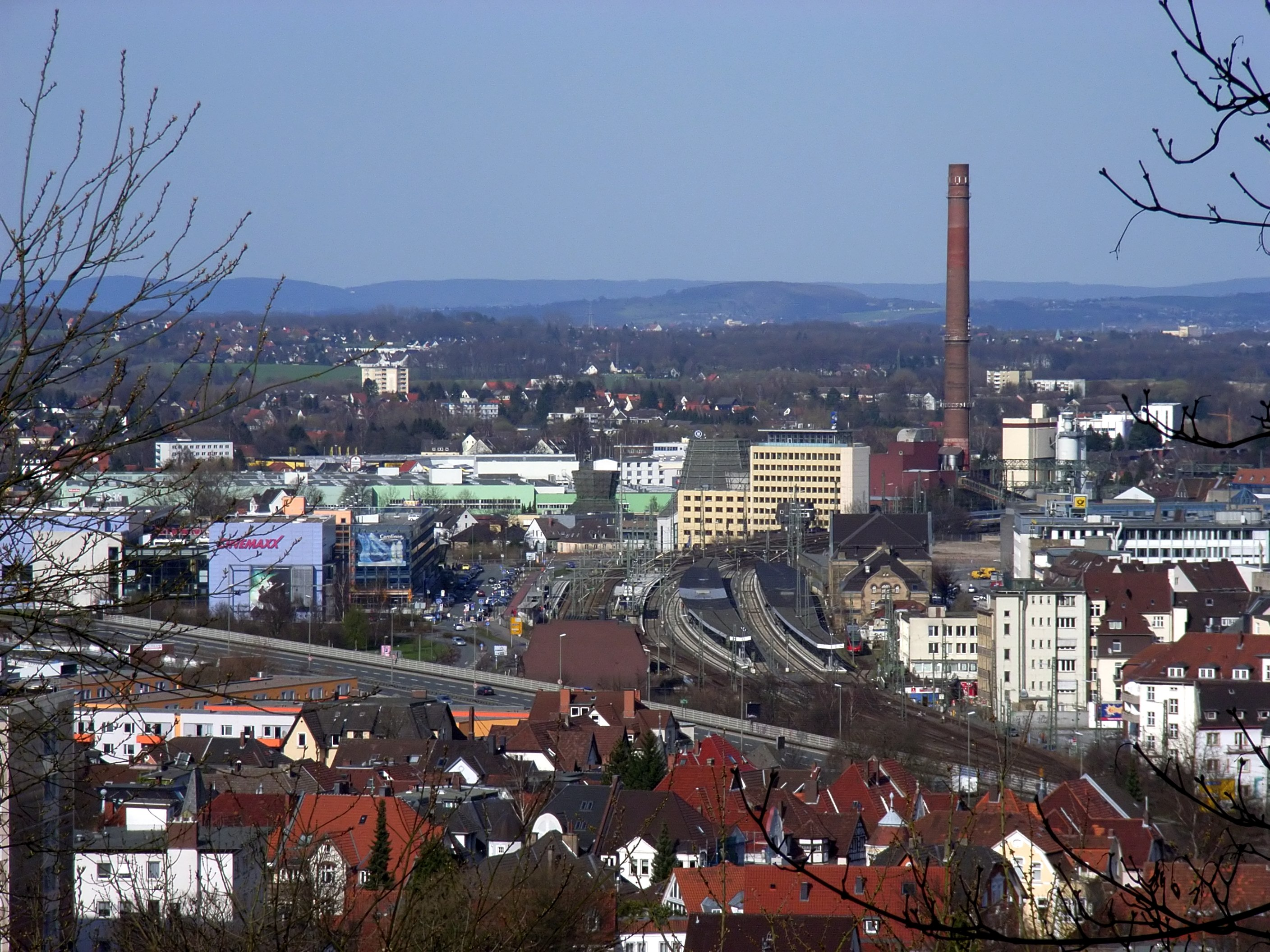 Bielefeld, Deutschland: Blick vom Johannisberg auf Bielefeld in Richtung Norden: Hauptbahnhof, Neues Bahnhofsviertel, Miele, Stadtwerke.